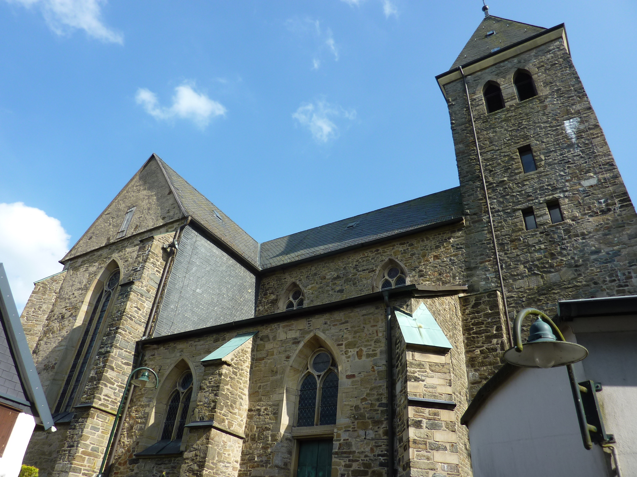 Evangelische Jakobus-Kirche (Breckerfeld)